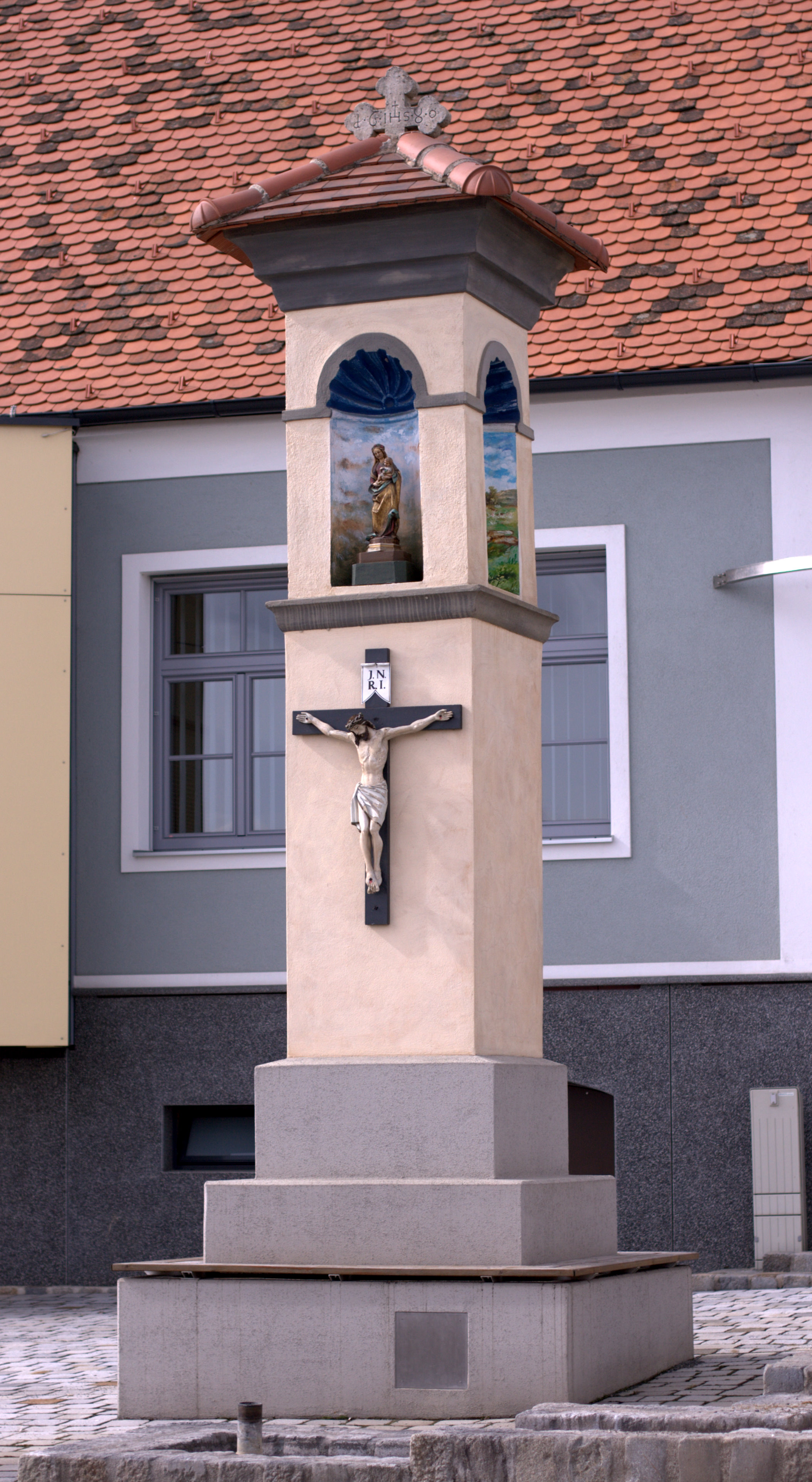 Penzendorf Bildstock